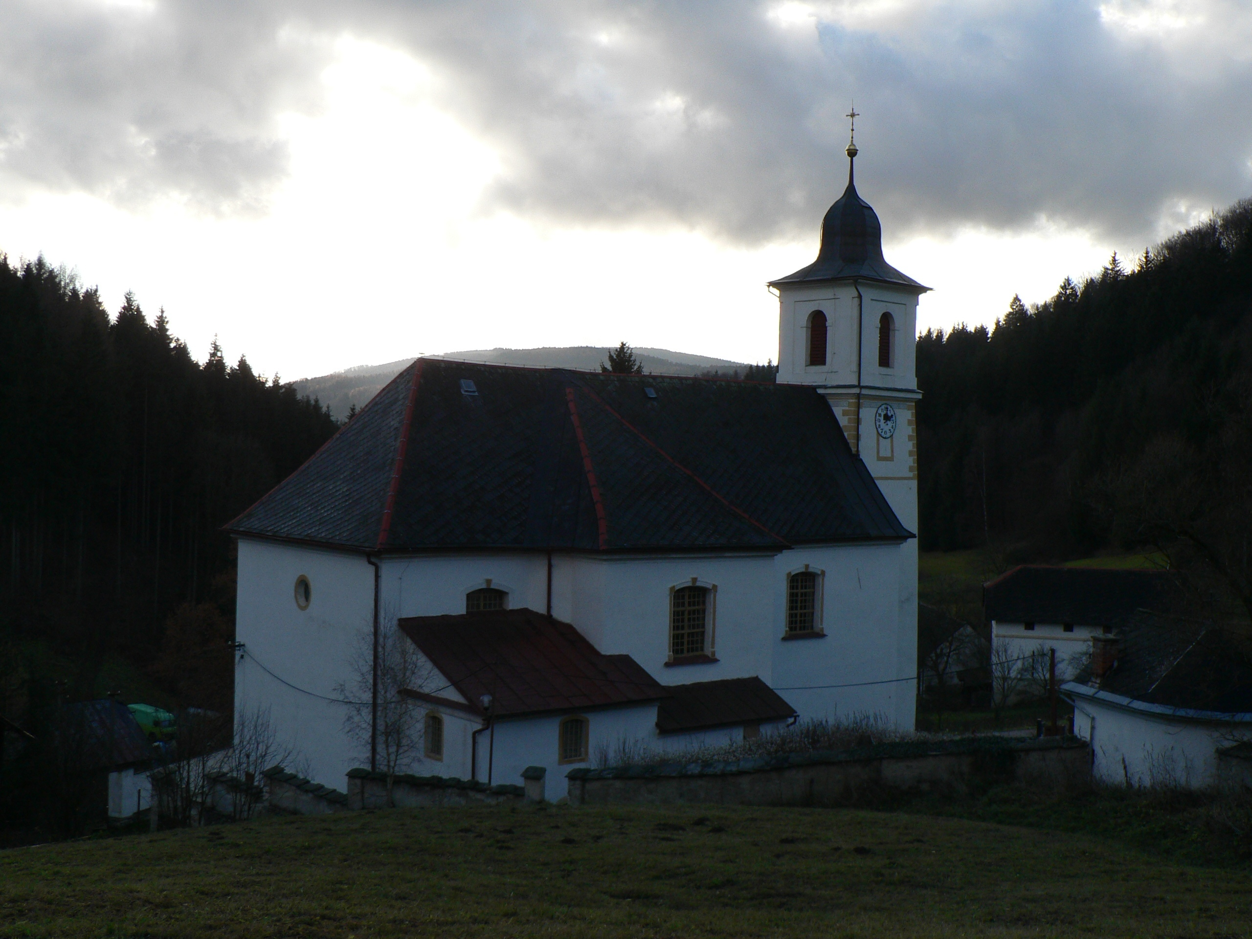 Kostel svatého Mikuláše (Hanušovice)